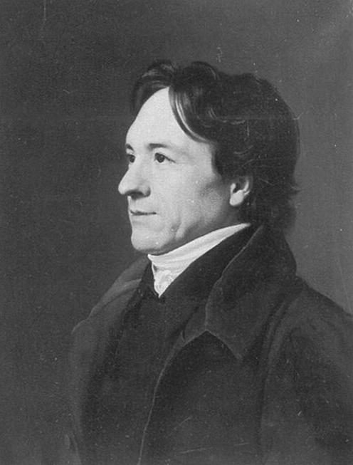 Bildnis des Dresdner Professors Karl (August) Förster. Öl & Pappe. Staatliche Kunstsammlungen Dresden, Gemäldegalerie Neue Meister, Inv.-Nr. 1868 & 2212